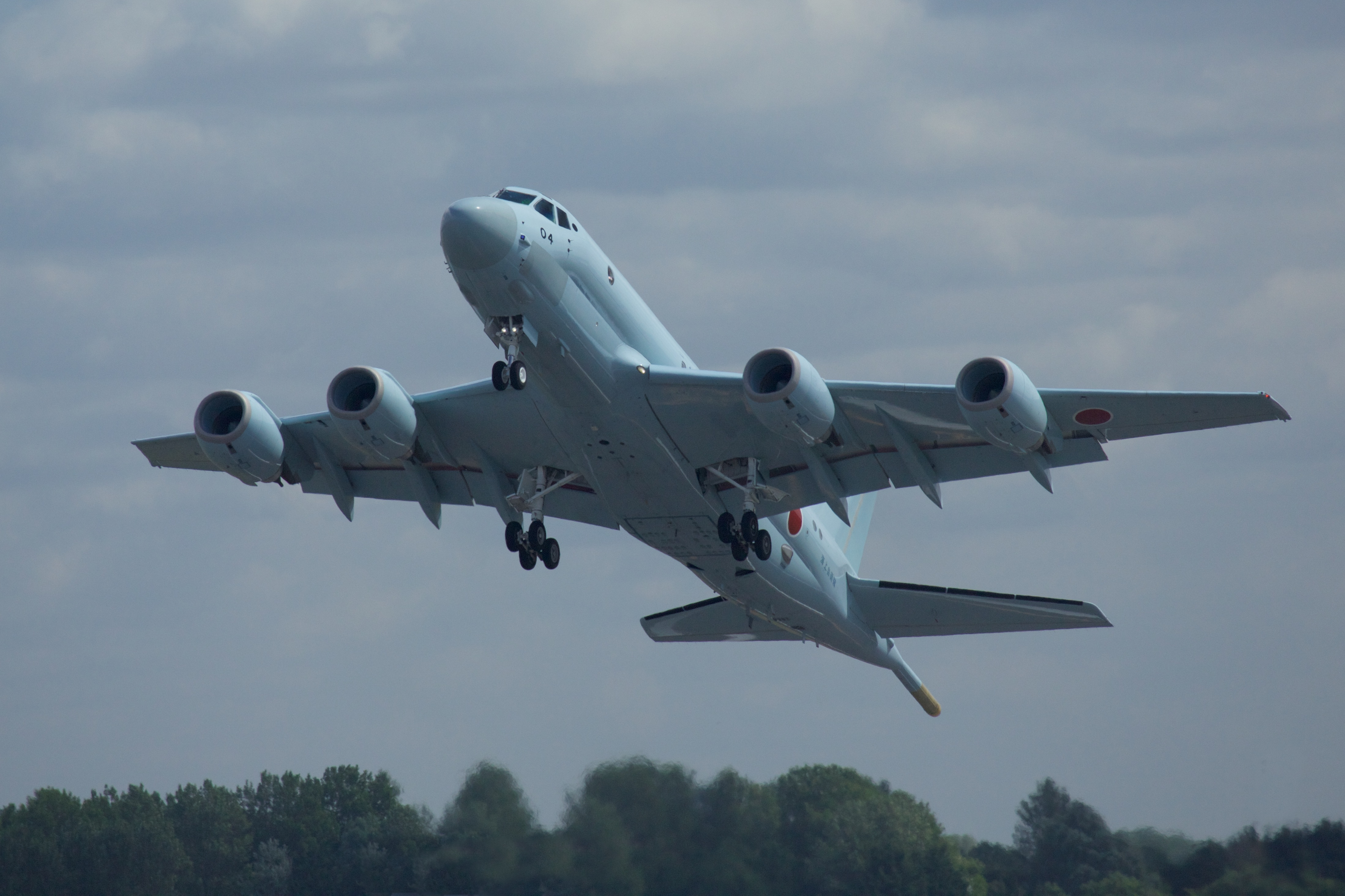 Kawasaki P-1